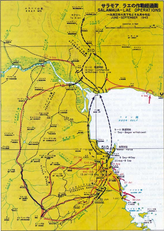 Salamaua-Lae Operations, June-September 1943